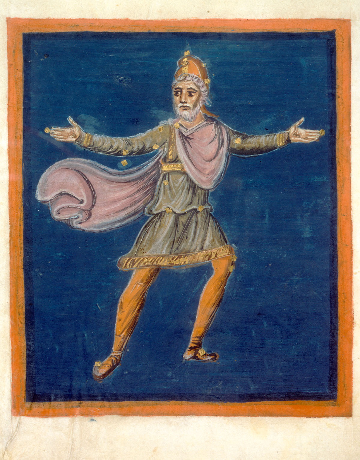 Cepheus, Fol. 26v